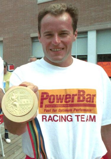 Dariusz Goździak, Arkadiusz Skrzypaszek, Maciej Czyżowicz. 1992 Summer Olympics.